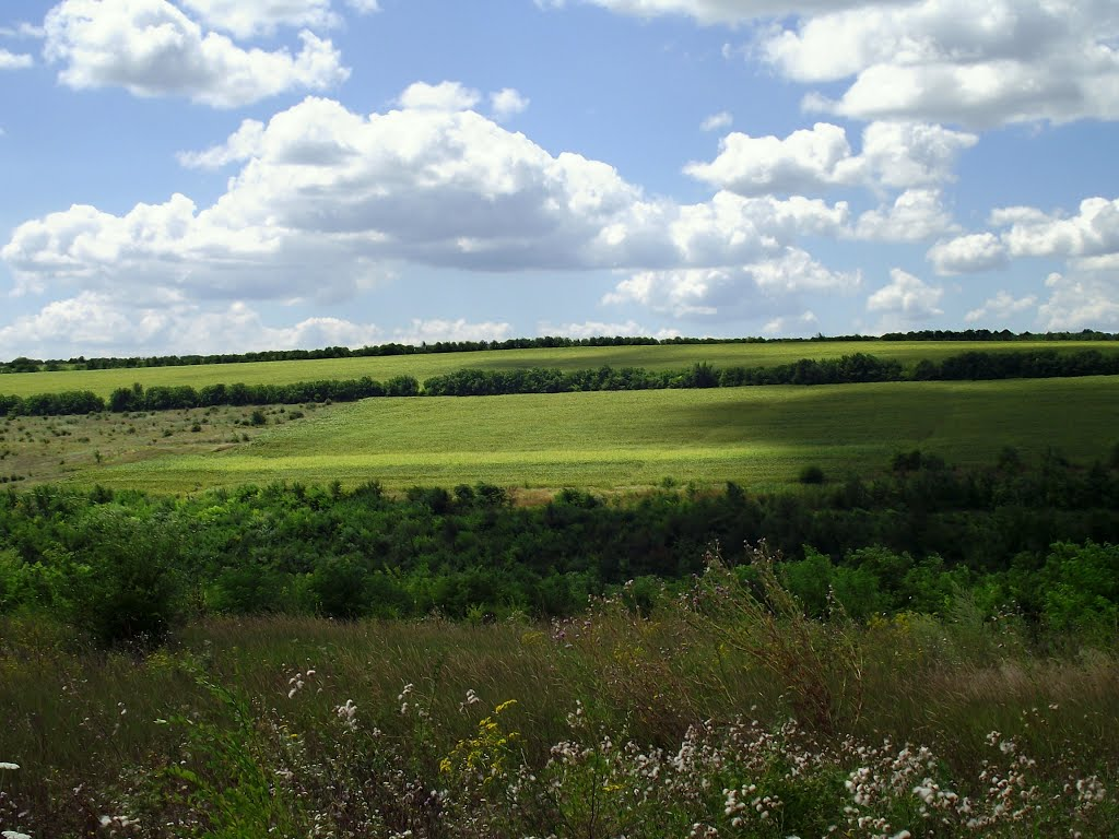 Peisaj de primăvară